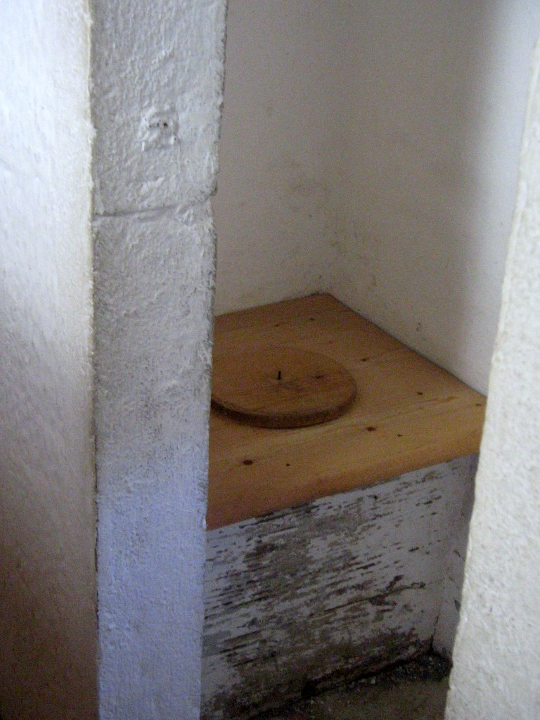 Predjama Castle, near Postojna, Slovenia, stranišče